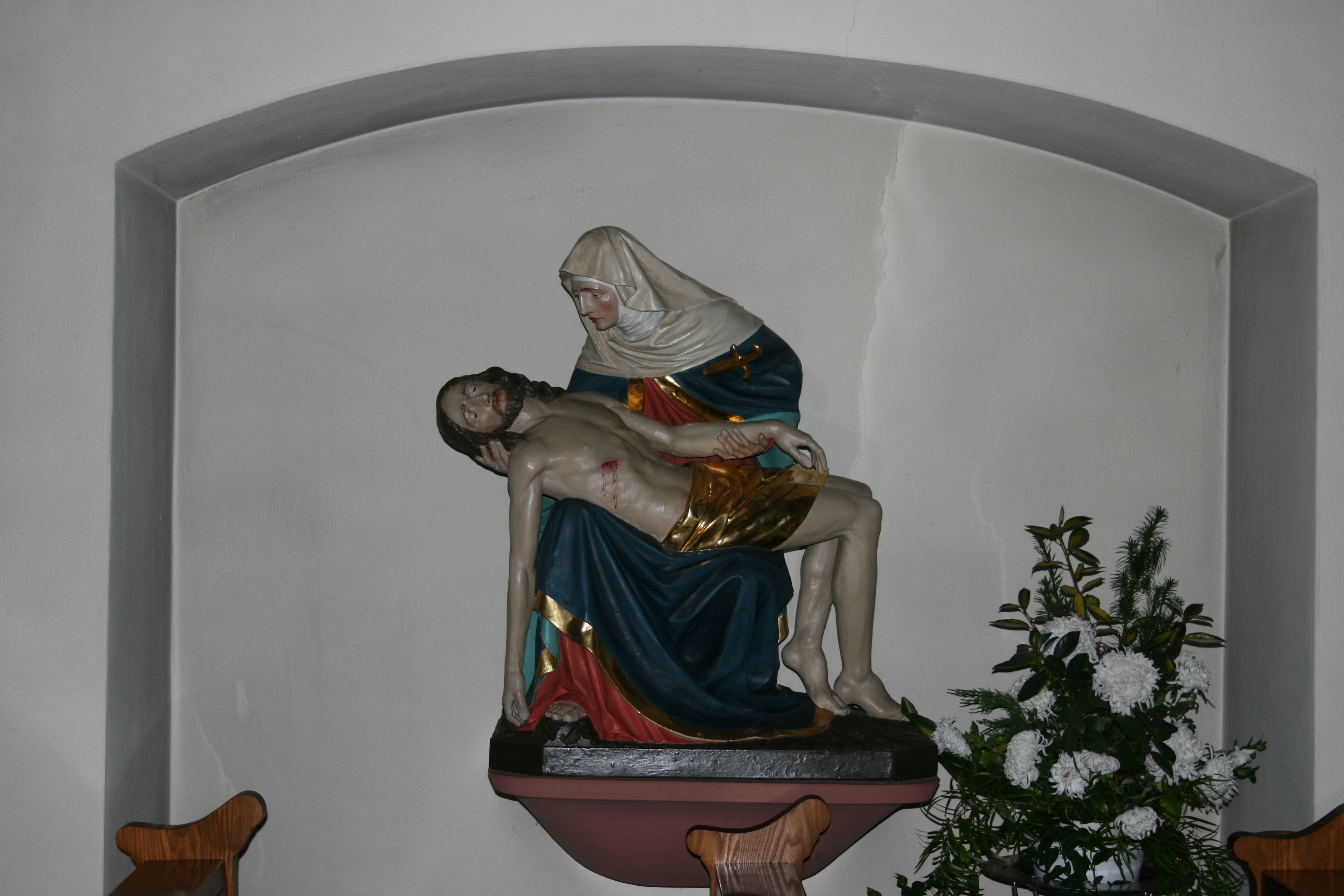 Pietà in der katholischen Kirche in Billigheim-Allfeld.